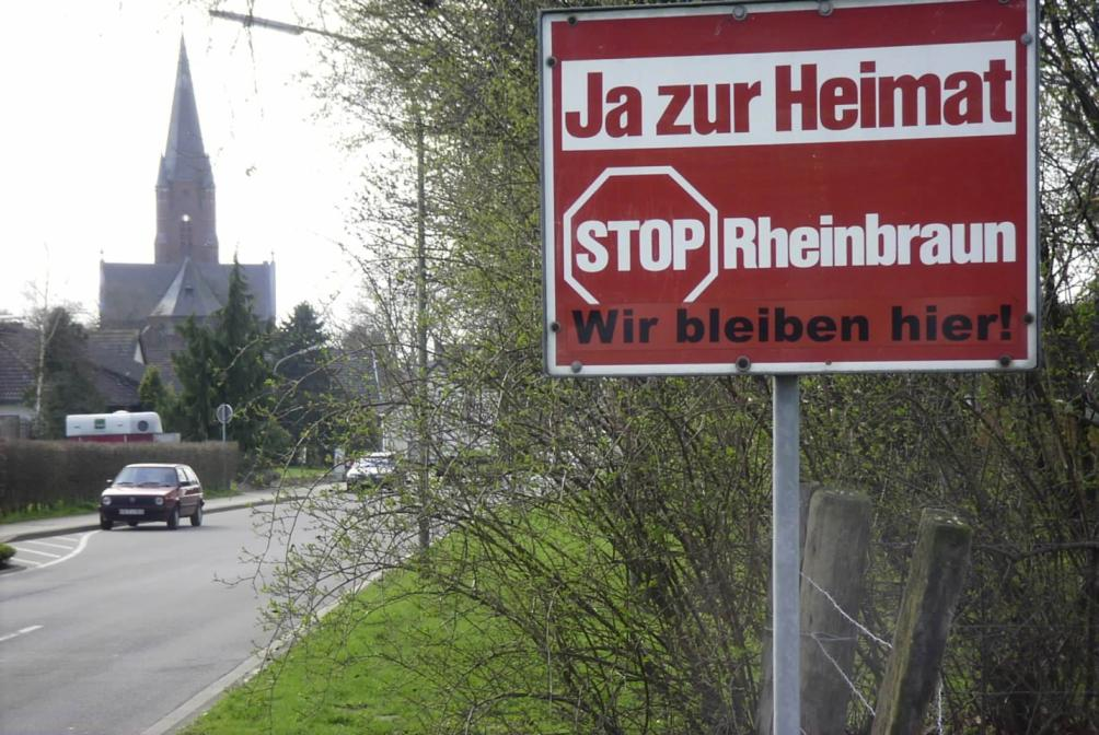 Protestschild am Ortseingang Hozweiler gegen den Tagebau Garzweiler